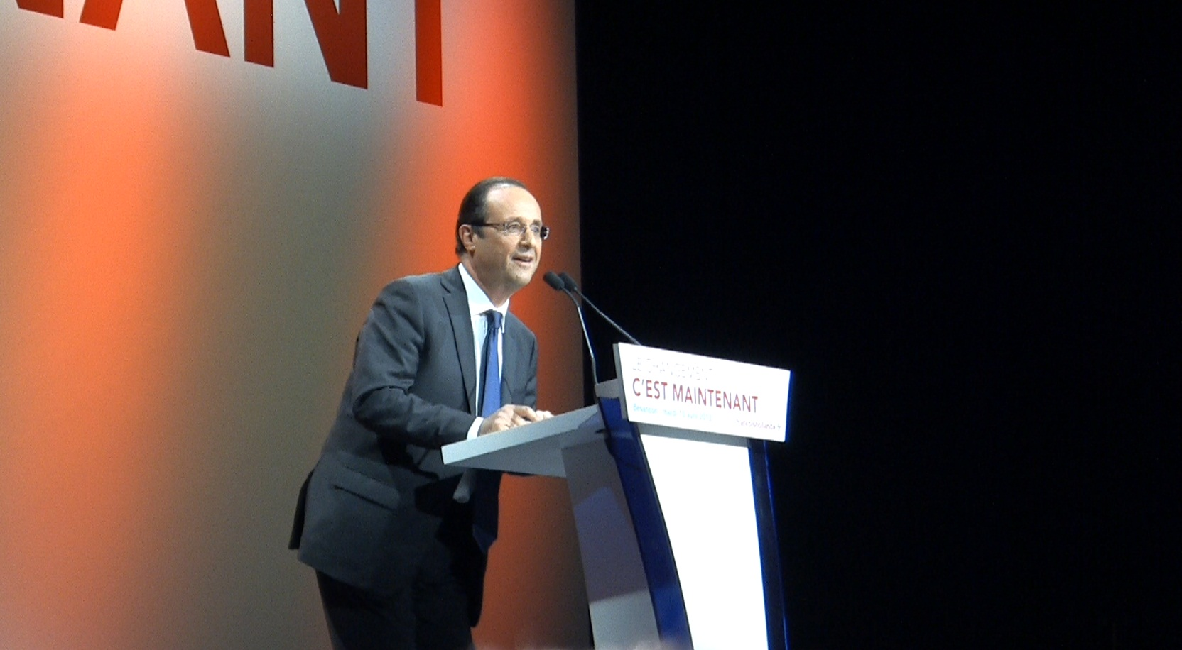 François Hollande, candidat du Parti socialiste et du Parti radical de gauche pour l'élection présidentielle de 2012, au meeting socialiste de Besançon du 10 avril 2012.